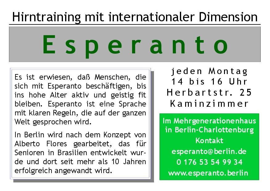 Varbilo por "Esperanto kiel terapio" en Lietzensee